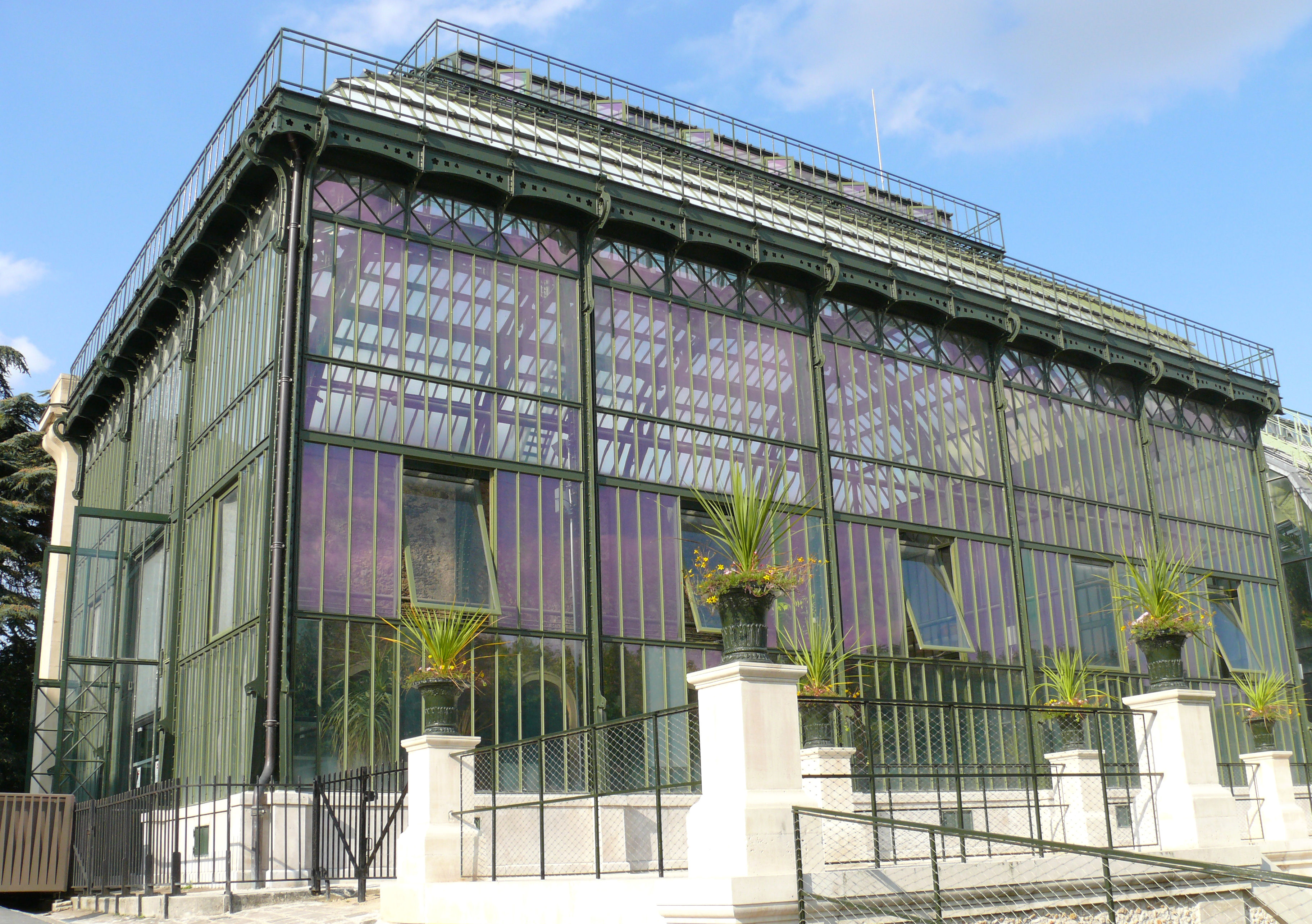 Serres du Jardin des Plantes de Paris - Serre mexicaine